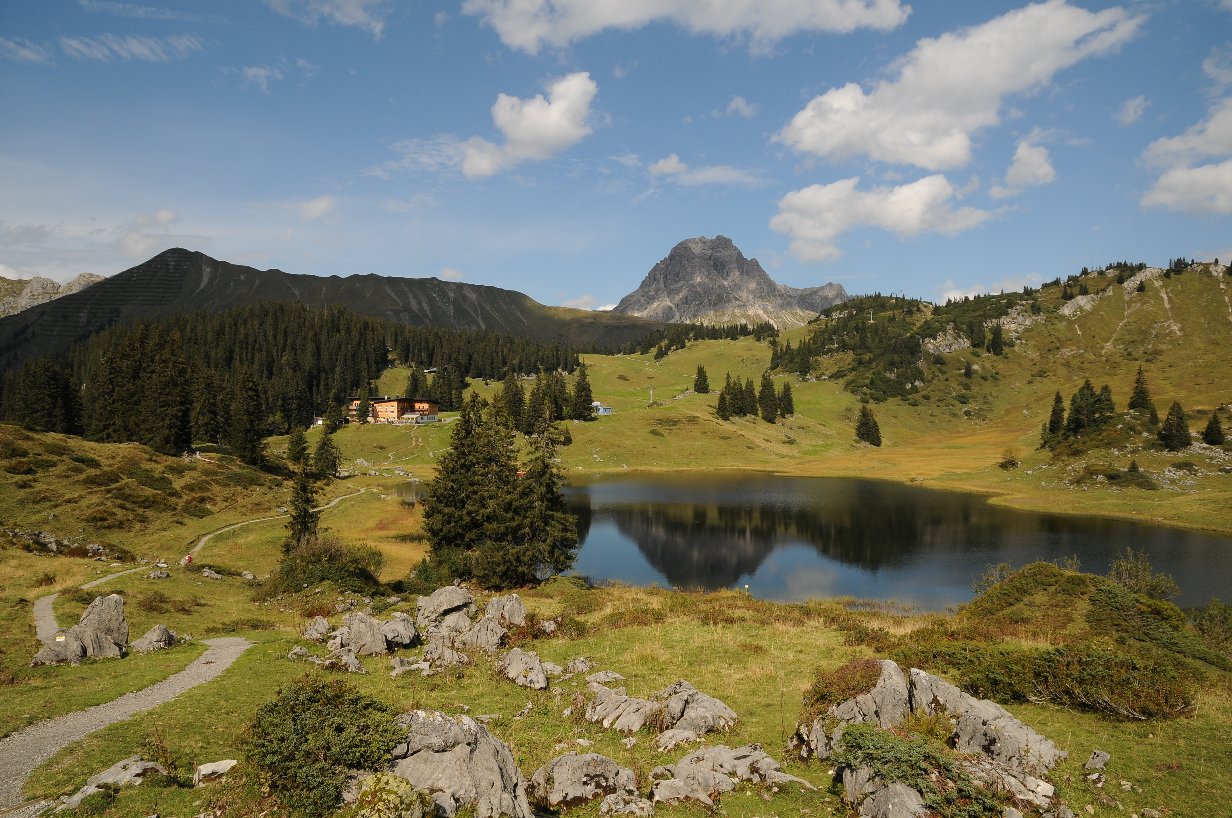 Der Körbersee im Hintergrund der Große Widderstein.